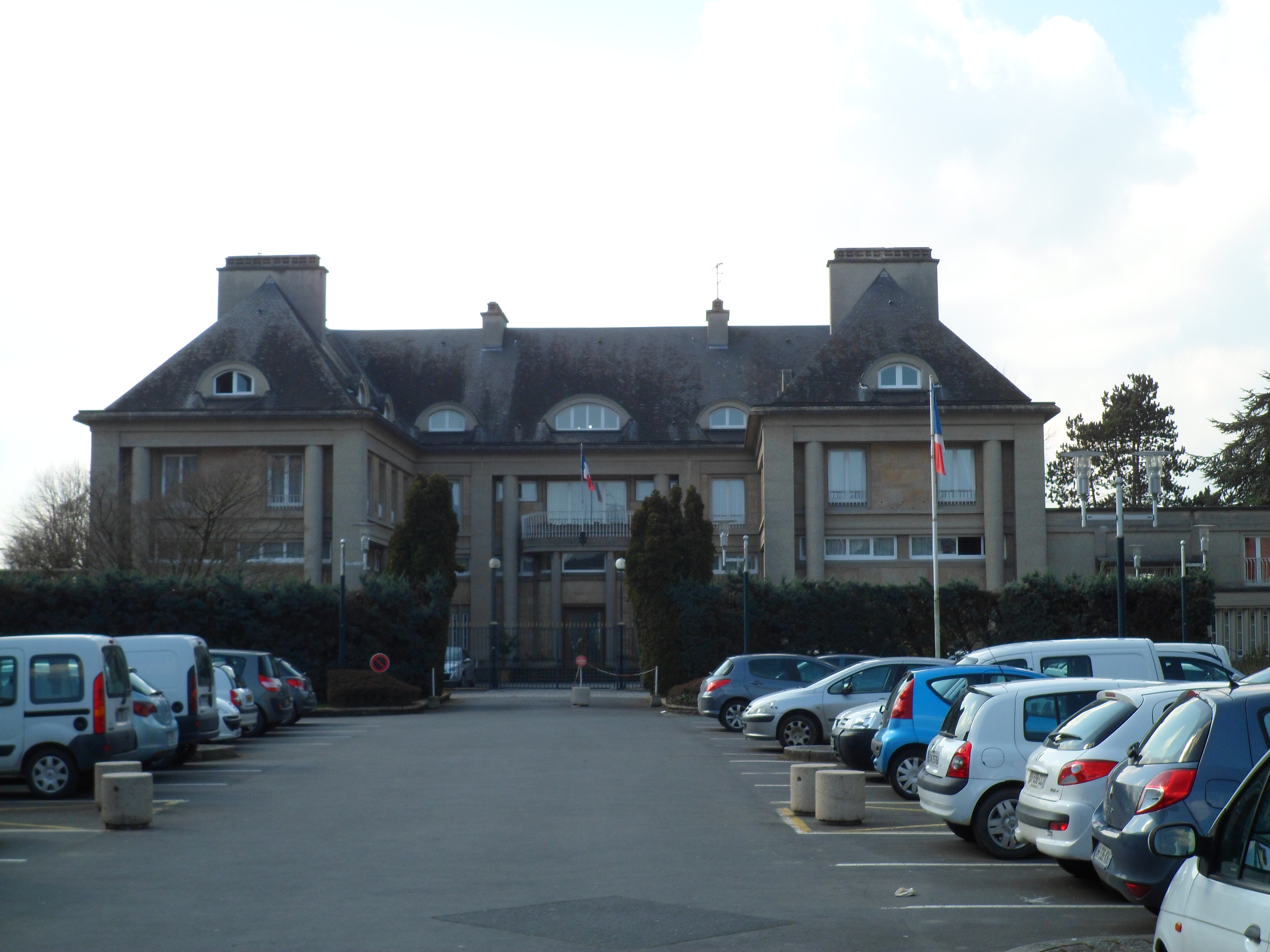 Préfecture de la Manche, Saint-Lô